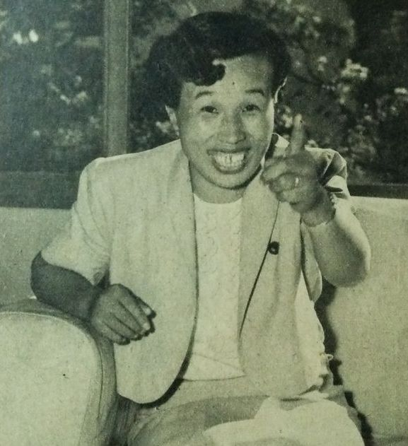 堤ツルヨ（右派社会党議員）